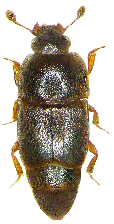 Familie: Nitidulidae Grösse: 2-3,5 mm Verbreitung: Kosmopolit Ökologie: Entwicklung in pflanzlichen Produkten Fundort: Germania, Bayern, Oberfranken, Selbitz leg.det. U.Schmidt, 2001 Foto: U.Schmidt, 2005